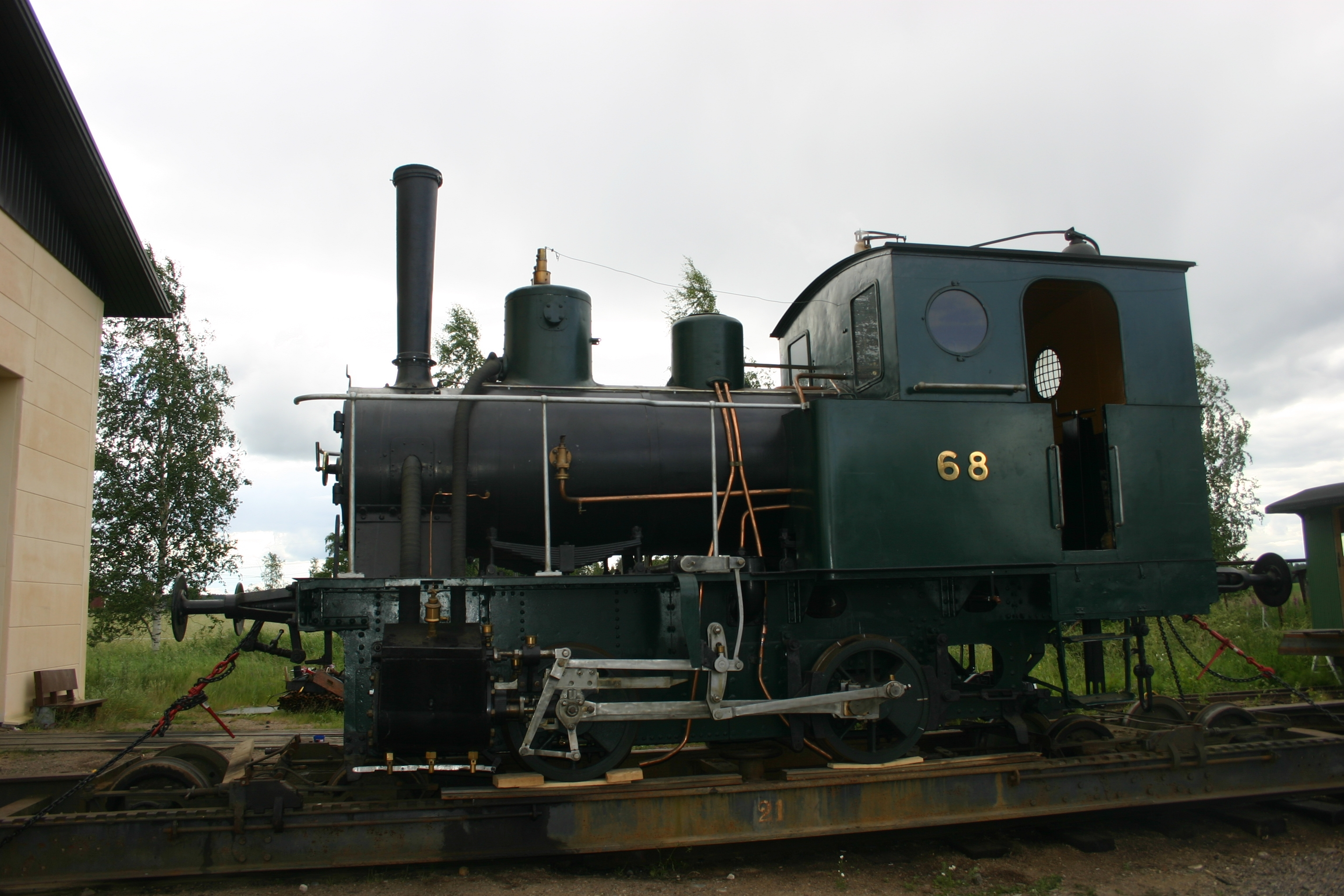 kunnostettu höyryveturi